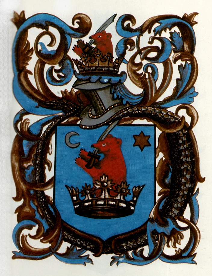 Armoiries de la famille hongroise "enyingi Török" (von Török un Enying). Baron Török. Tiré de l'ouvrage "Magyaro.családai" de Nagy Iván, 1865